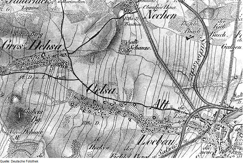 Original image description from the Deutsche Fotothek Löbau-Großdehsa. Oberreit, Sect. Zittau, 1844/46